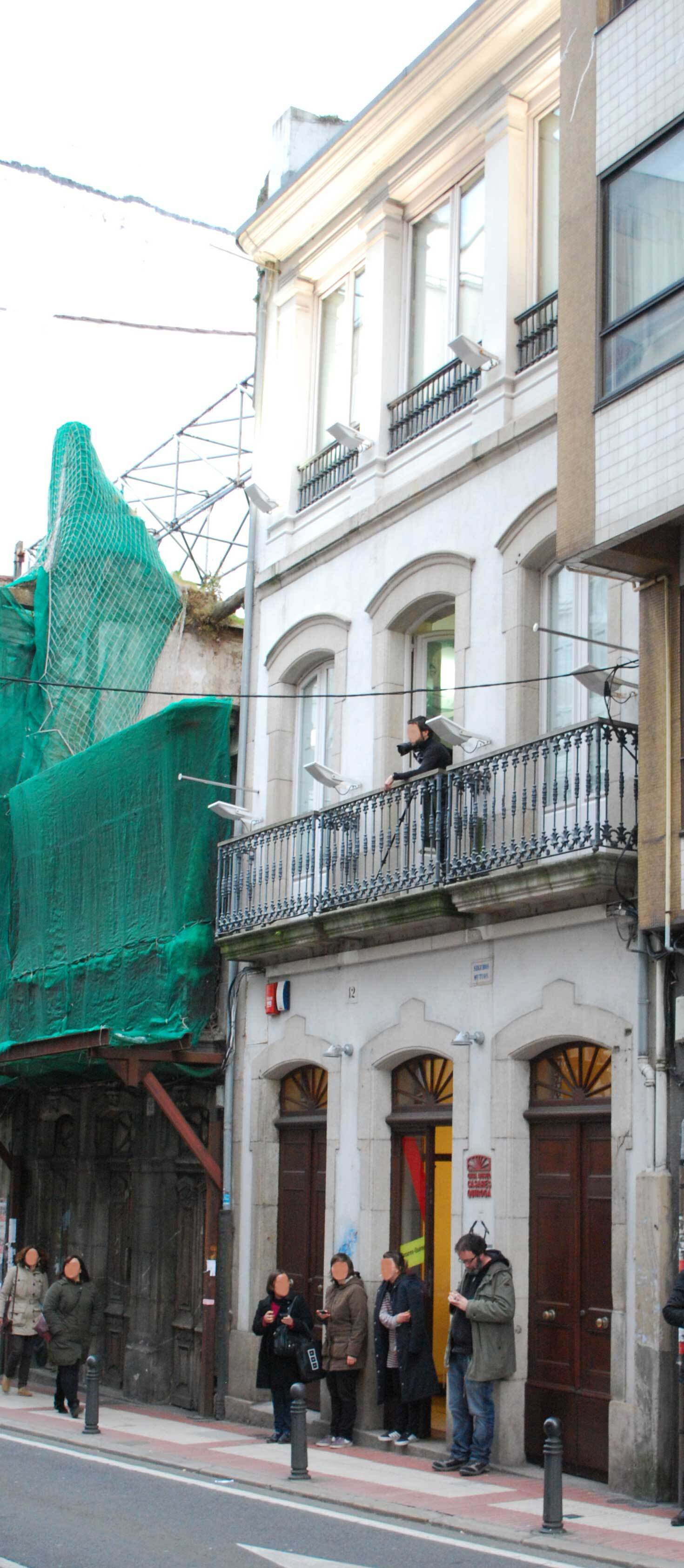 Museo Casares Quiroga rúa Panadeiras A Coruña Galiza Spain